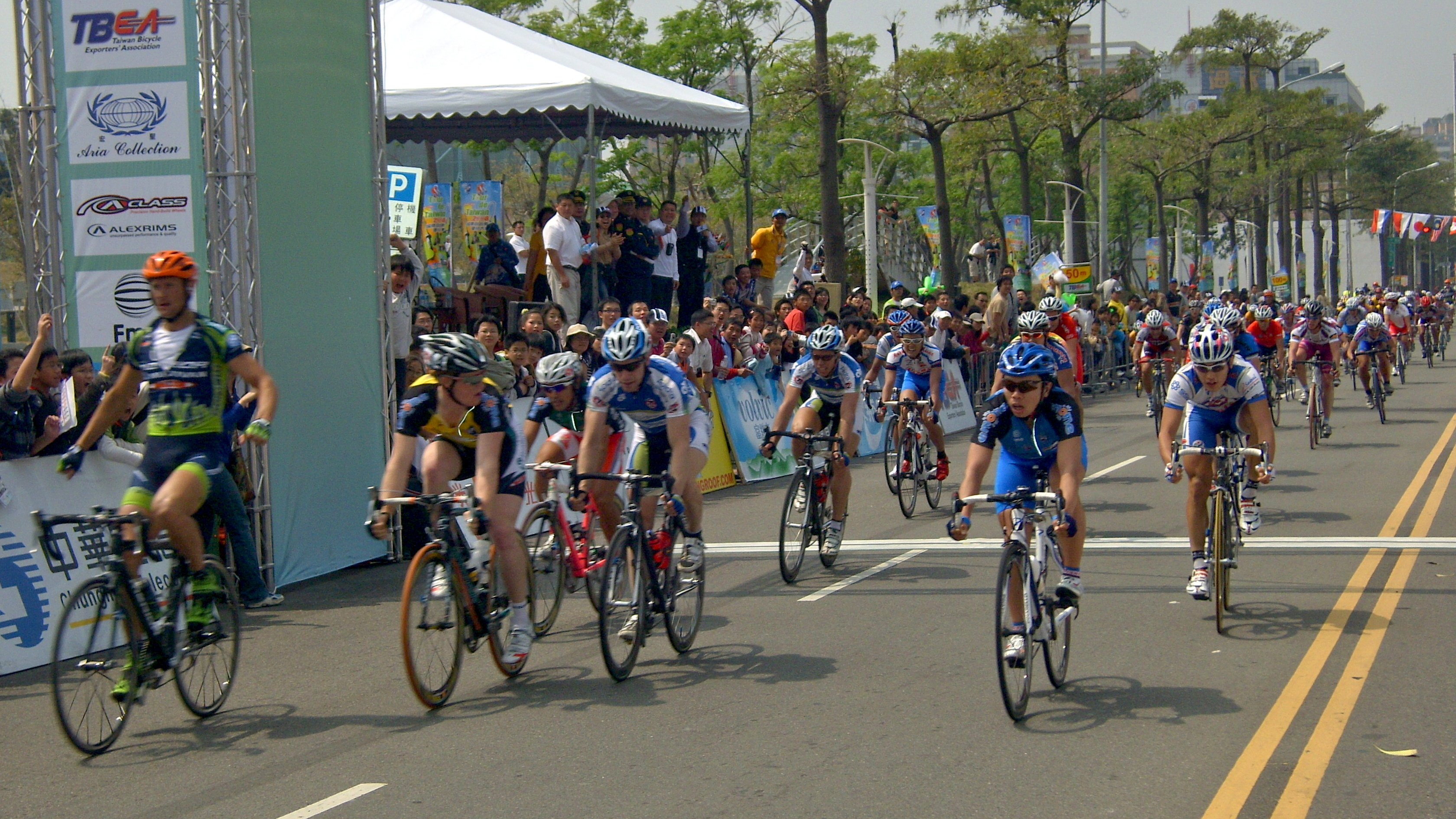 2008 Tour de Taiwan Taichung Stage: Decisive Limit.